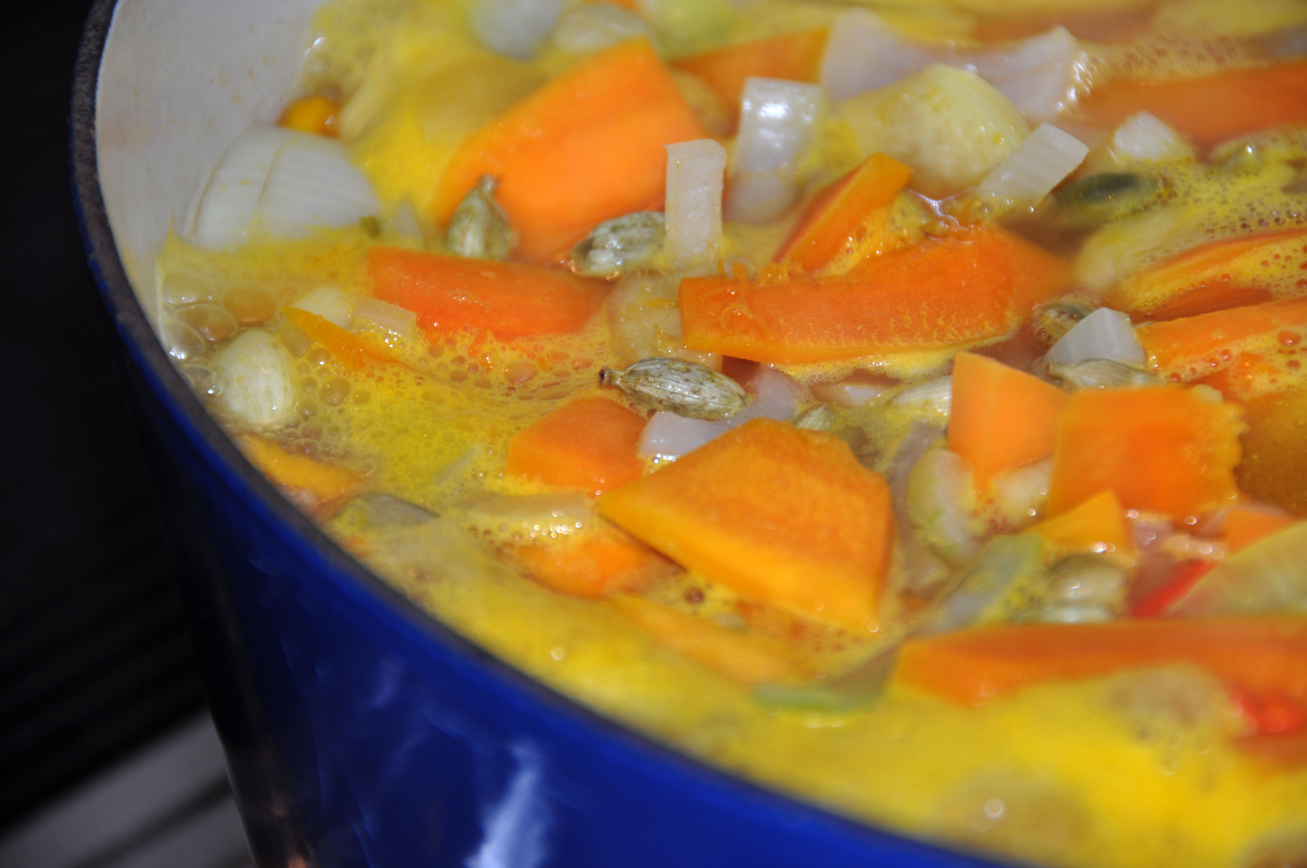 Græskarsuppe med kardemomme